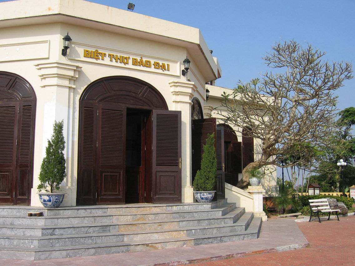 Ancienne villa d'été occupée par l'empereur Bao Daï